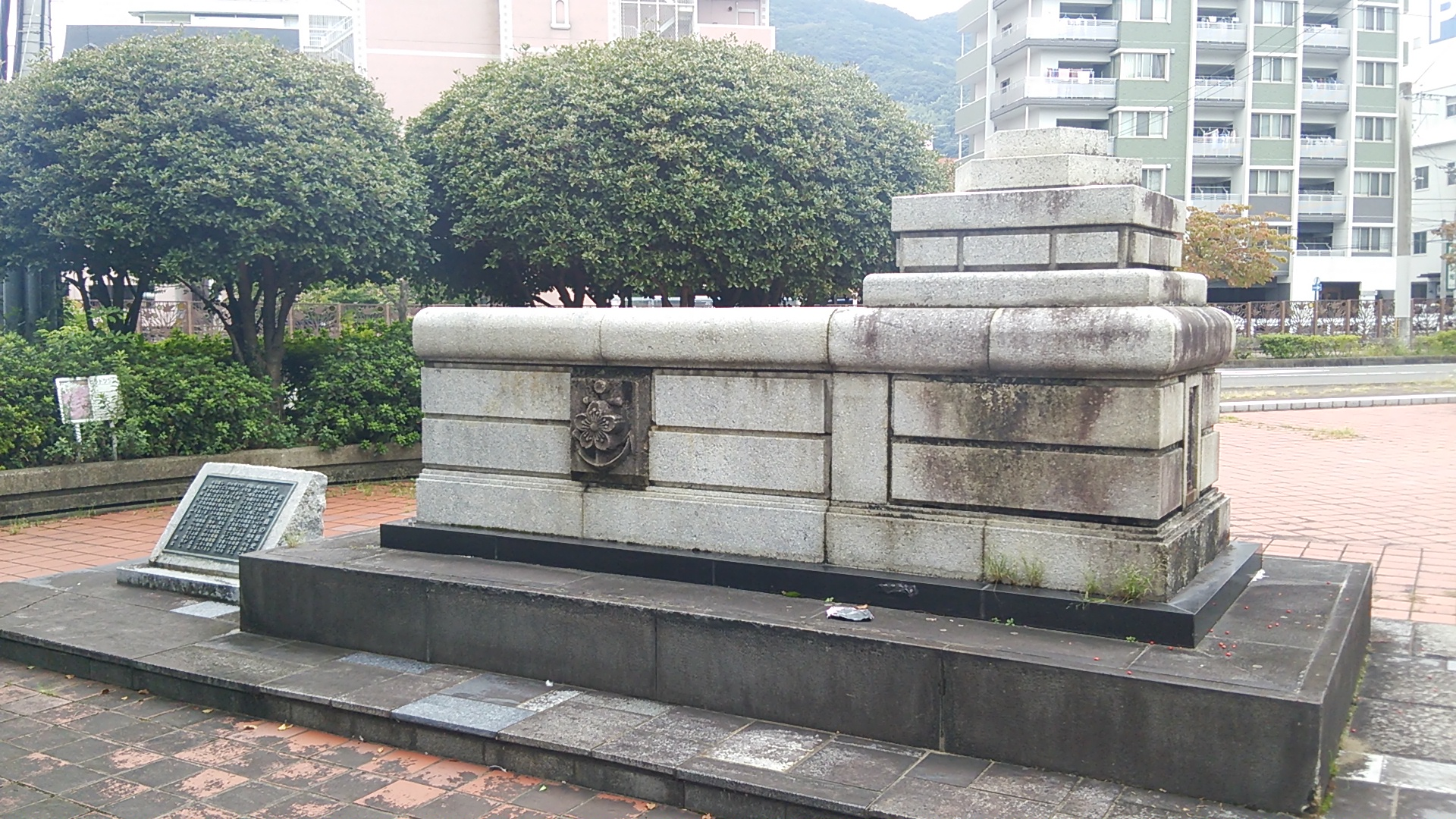 佐世保橋(海軍橋)の復元親柱・高欄。